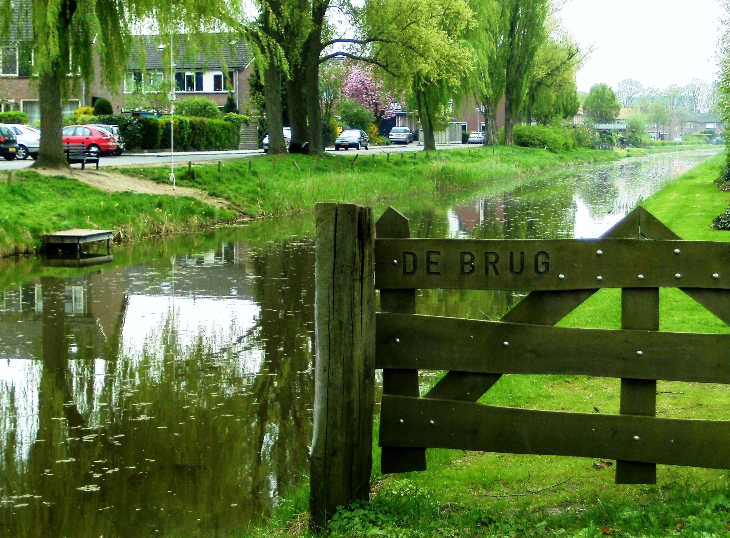 Zandwetering bij de Schapenbrug te Diepenveen in 2009